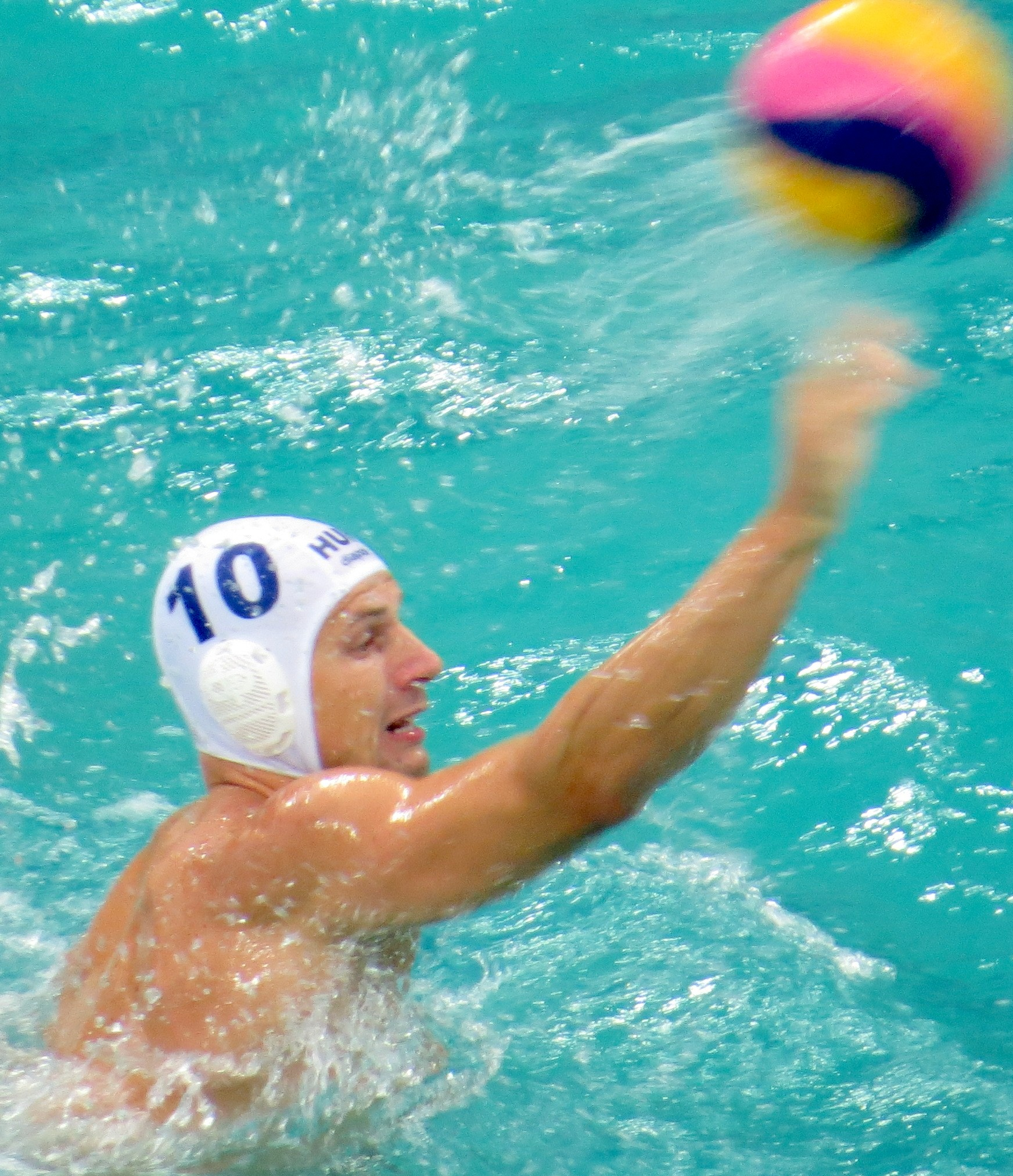 Rio 2016. Polo aquatico. sx50 09